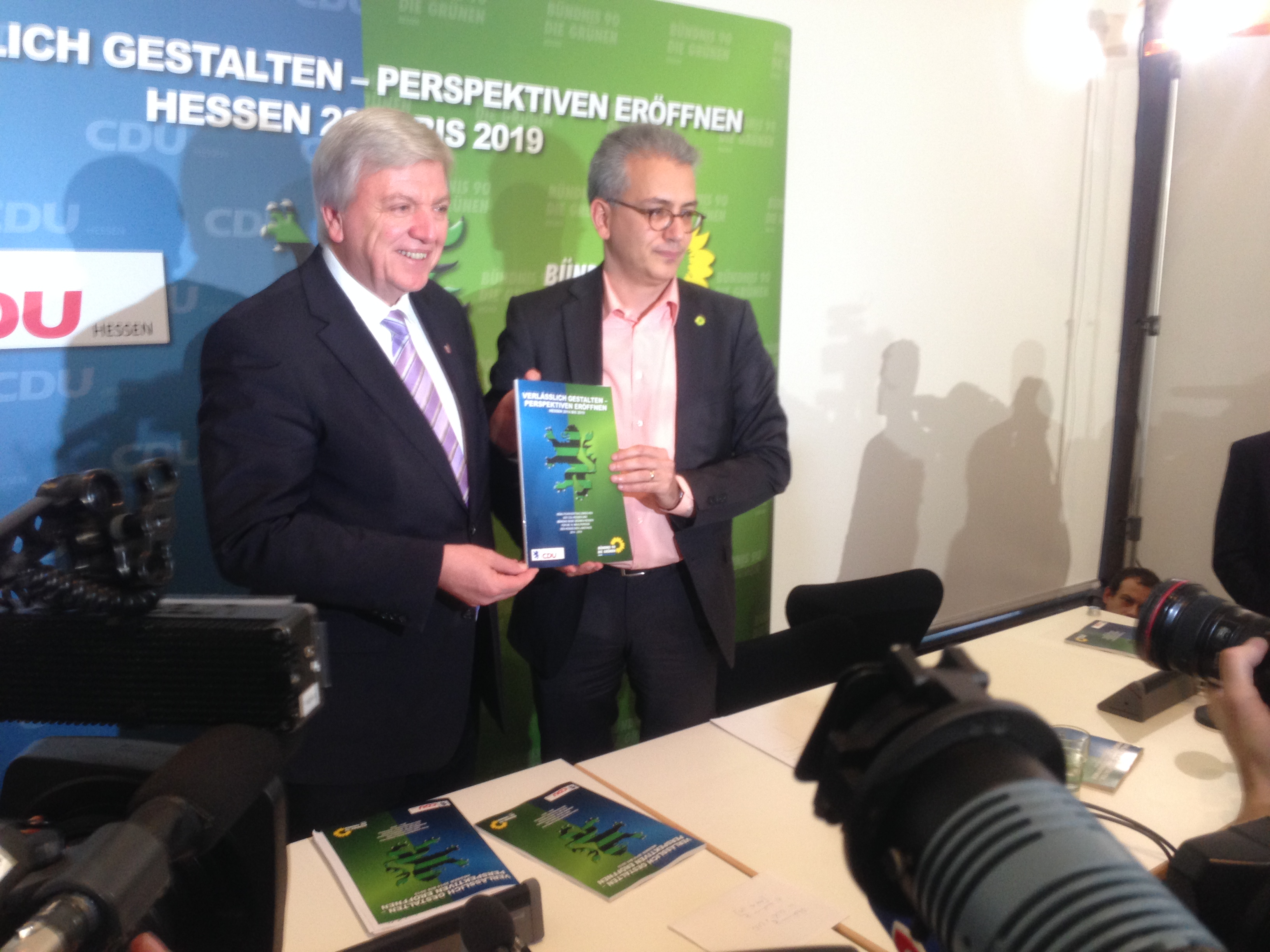 Hessens Ministerpräsident Volker Bouffier (CDU) und der damalige Landesvorsitzende der Grünen Tarek Al-Wazir präsentieren nach einer Pressekonferenz im Hessischen Landtag den ausgehandelten schwarz-grünen Koalitionsvertrag.